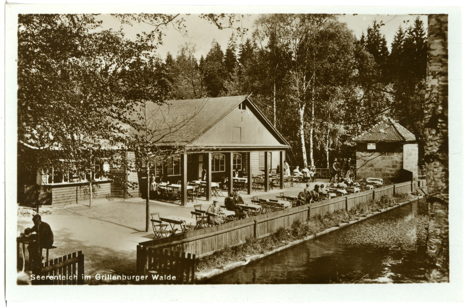 Grillenburg; Restaurant Seerenteich im Grillenburger Wald This postcard is from publisher Brück & Sohn in Meißen ( postcard has a unique number 23824 and is available in a higher resolution at the publisher. This images was uploaded in a cooperation project between Wikipedians and the publisher.